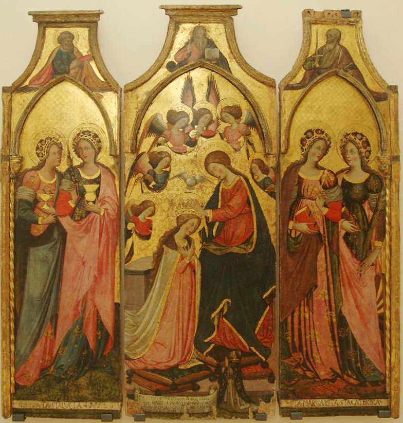 Trittico raffigurante l'Incoronazione della Vergine tra sante, e Dio Padre benedicente tra i santi Pietro e Paolo di Giovanni da Gaeta (1456), proveniente dalla chiesa di Santa Lucia a Gaeta e attualmente presso il Museo diocesano di Gaeta.